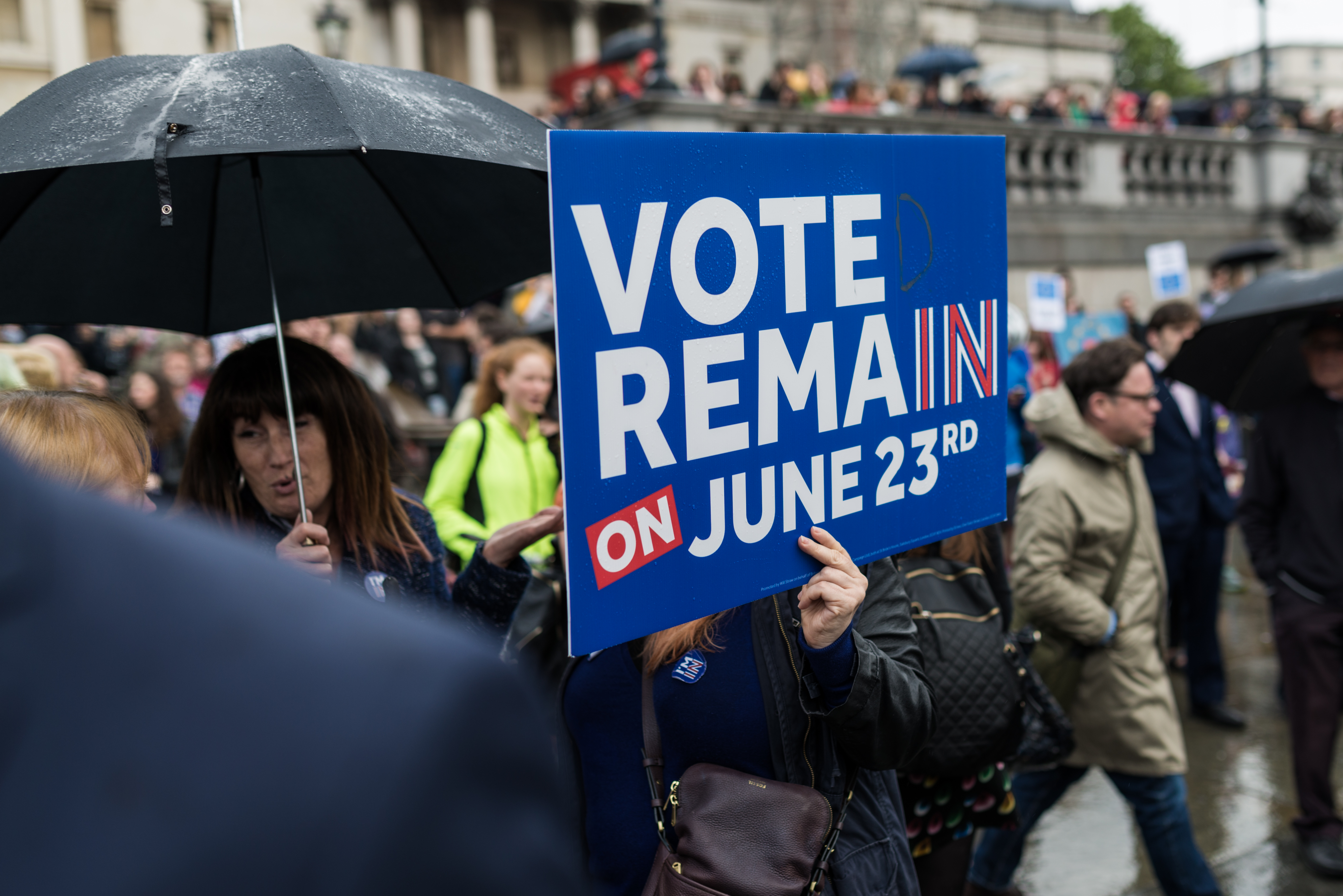 June-2016_0003